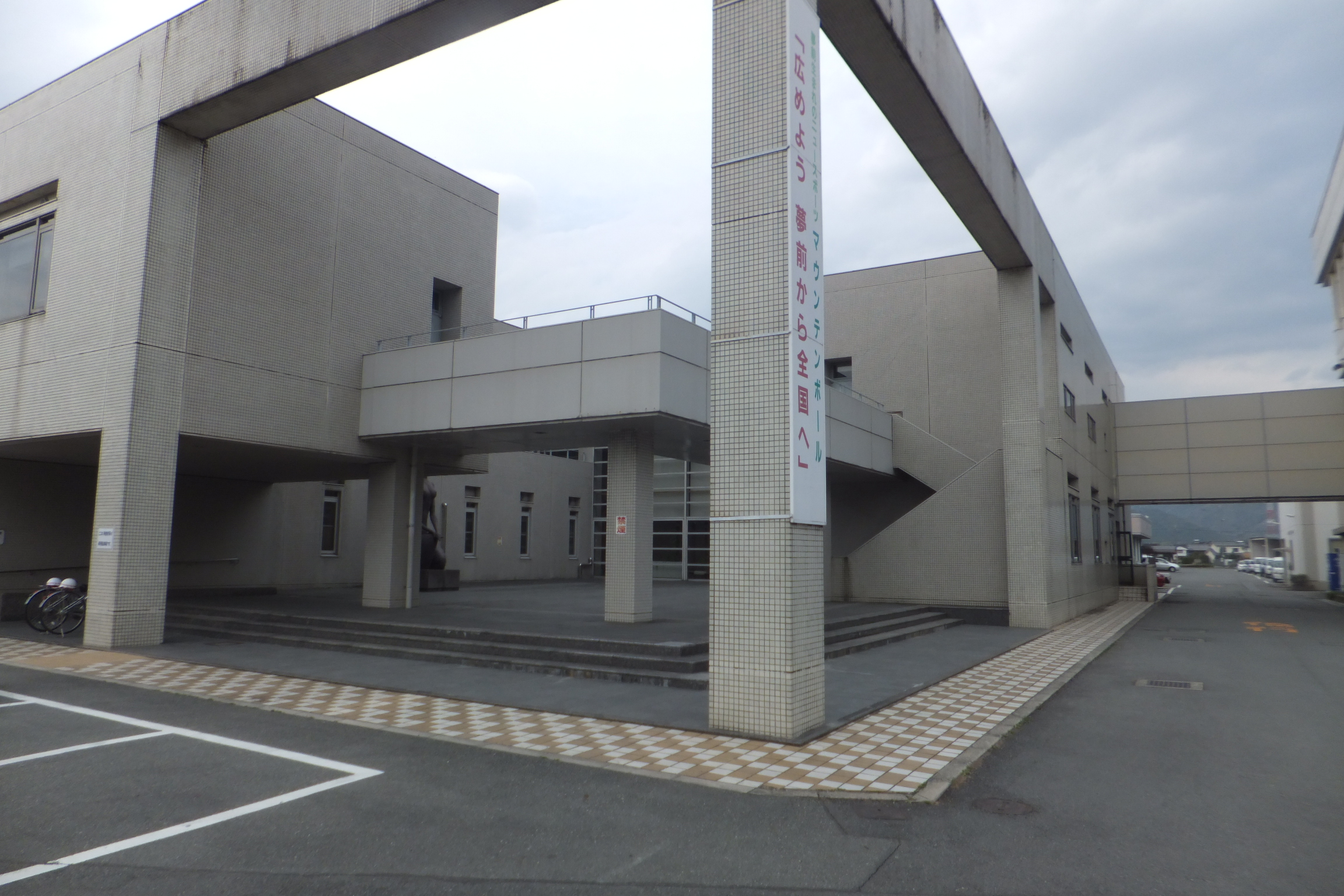 姫路市立図書館夢前分館